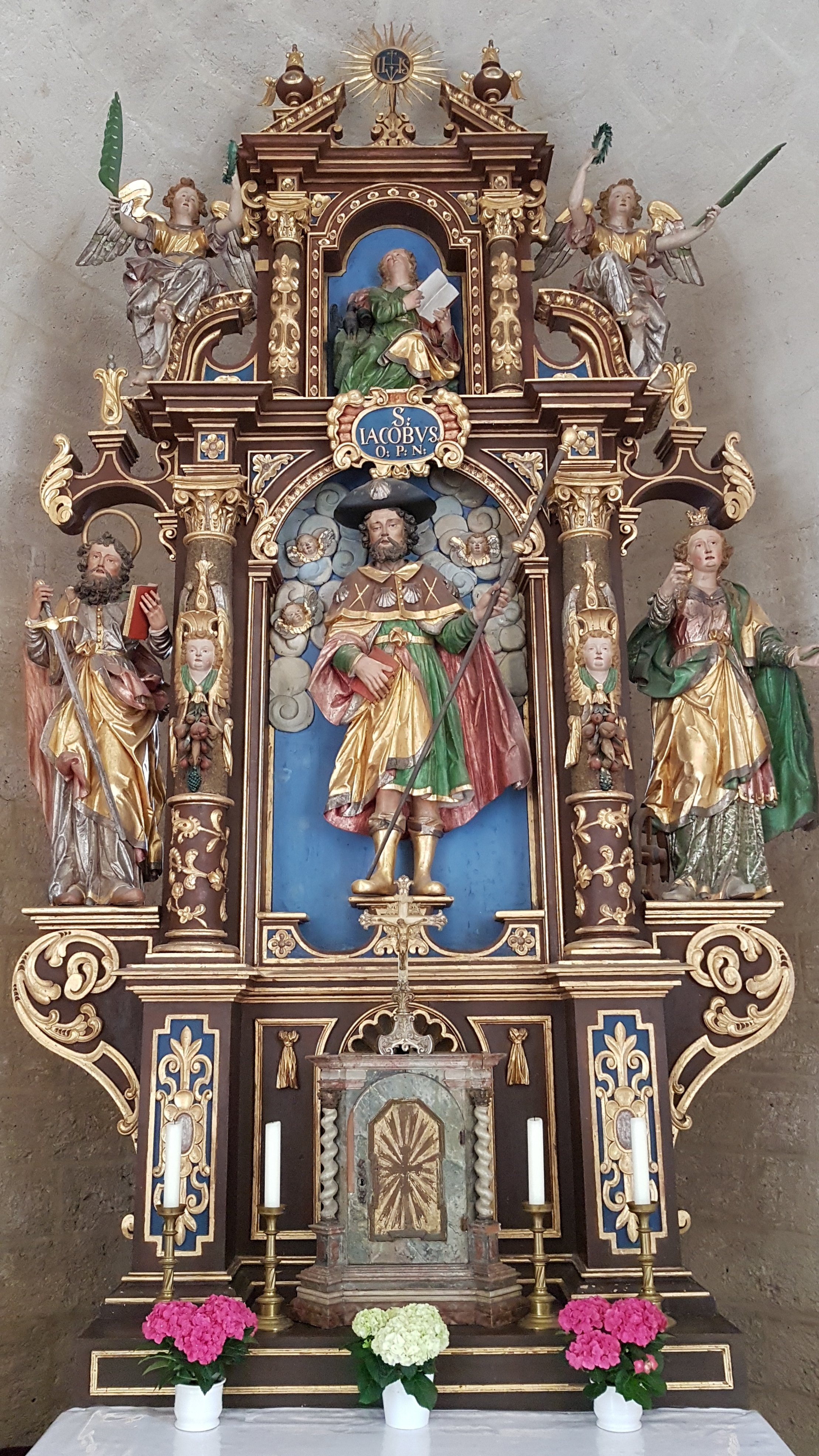 Sankt Jakobus (Schondorf am Ammersee)